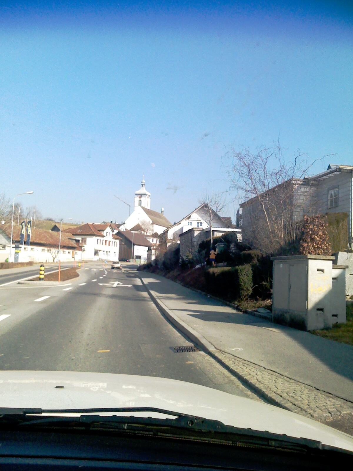 St. Gallenkappel, See-Gaster (Wahlkreis), Canton of St. Gallen, Switzerland - Sankt-Gallenkappel, See-Gaster (elektodistrikto), Kantono Sankt-Galo, Svislando